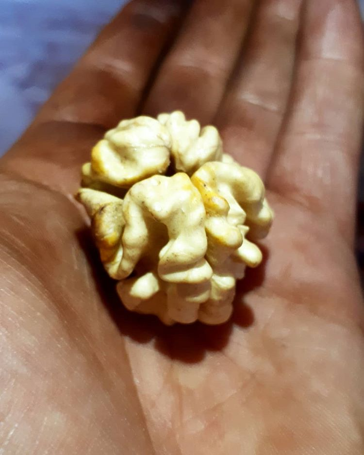 این گردو مربوط به روستای بوجان شهرستان تویسرکان می باشد .